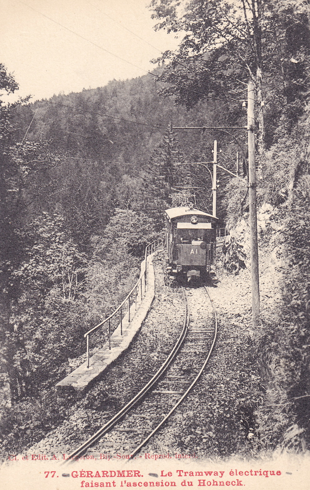 Carte postale ancienne éditée par A. Largeron, n°77 : GERARDMER - Le Tramway électrique faisant l'ascension du Hohneck